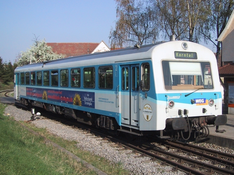 NE 81 der WEG im Bahnhof Hemmingen